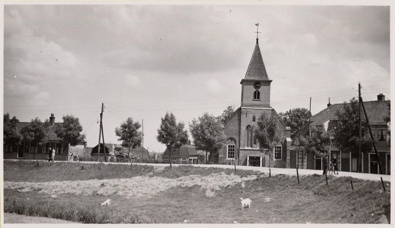 Beschrijving Sloterdijk Spaarndammerdijk 665-707, gezien in oostelijke richting met kerk op nummer 681 Documenttype foto Vervaardiger Eck, J. van (Jacobus, 1873-1946) Collectie Collectie J. van Eck: foto's Datering 18 juni 1939 Geografische naam Sloterdijk Spaarndammerdijk Inventarissen Afbeeldingsbestand A01634000630 Generated with Dememorixer